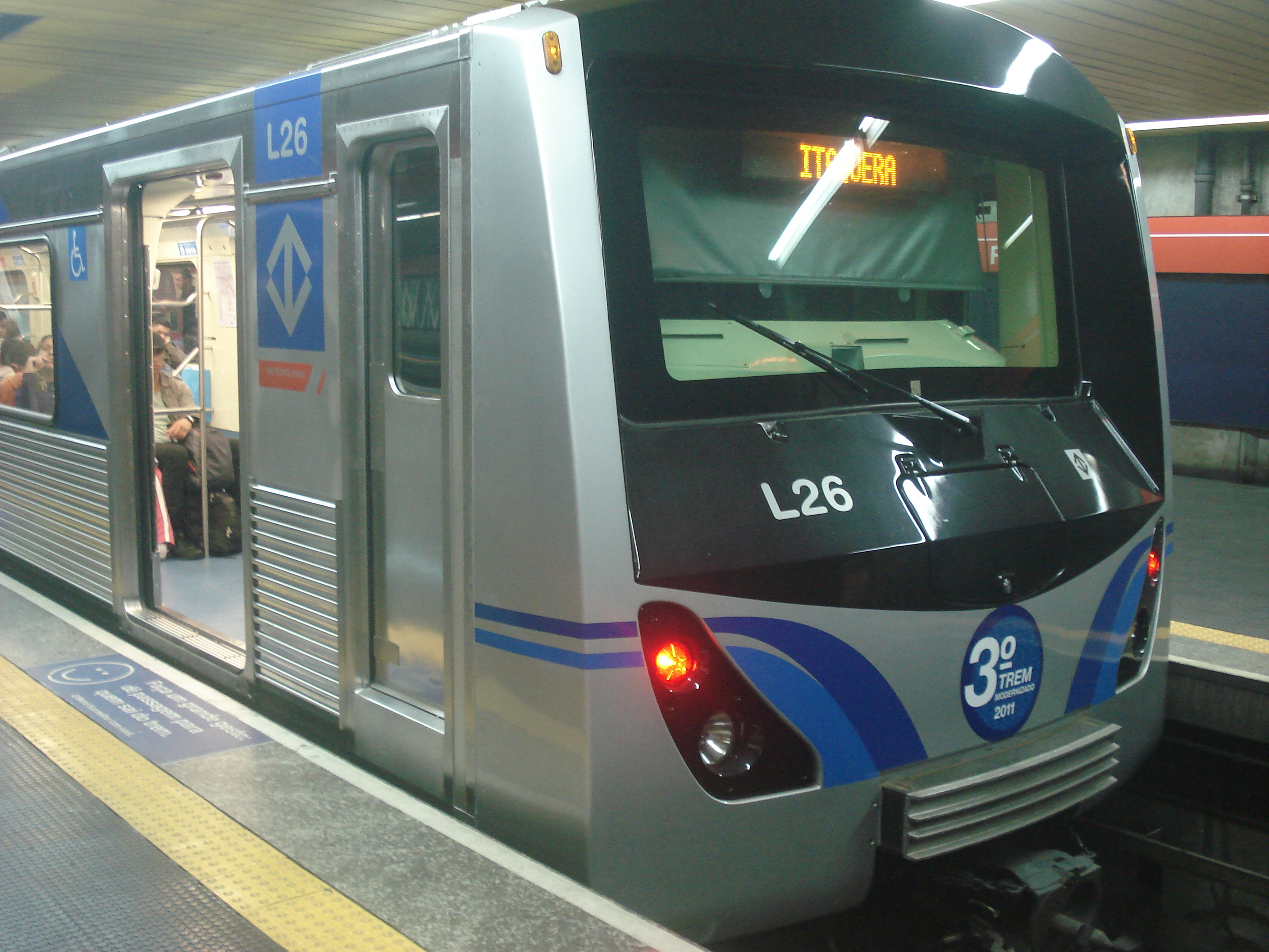 Alstom - L26 (Mafersa D26 Modernizado)